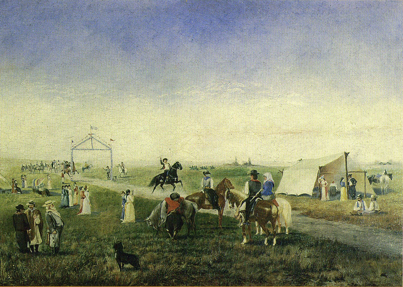 Obra del pintor uruguayo Horacio Espondaburu (1855-1902) “Corrida de sortijas”, óleo sobre tela ubicado en el Museo Histórico Nacional (Montevideo-Uruguay).